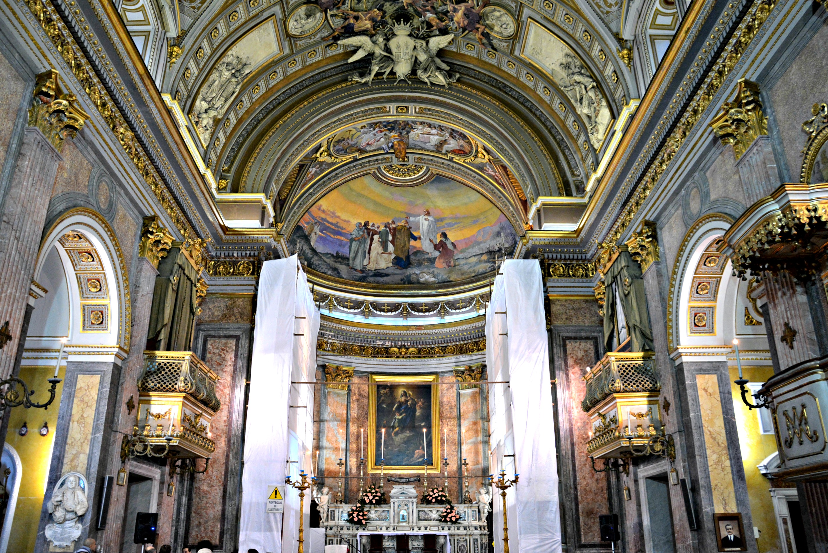 Vedi titolo